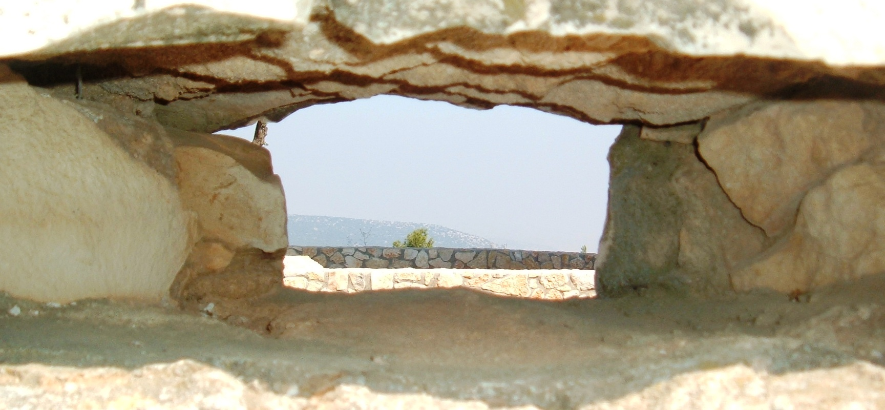 view from a shooting position in Birya fortress. תמונה מבעד לחרך ירי בחומת מצודת ביריה